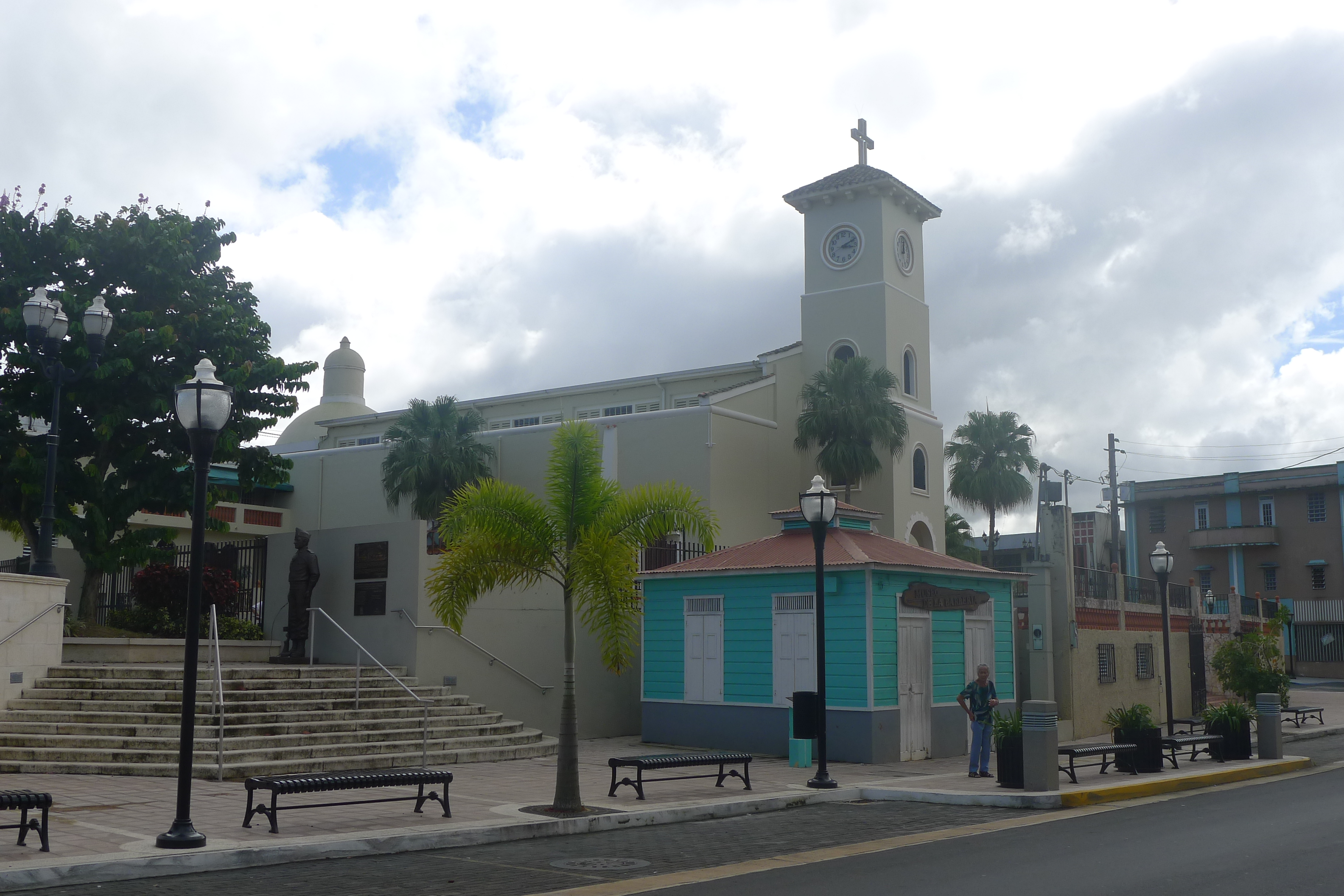 Corozal, 00783, Puerto Rico